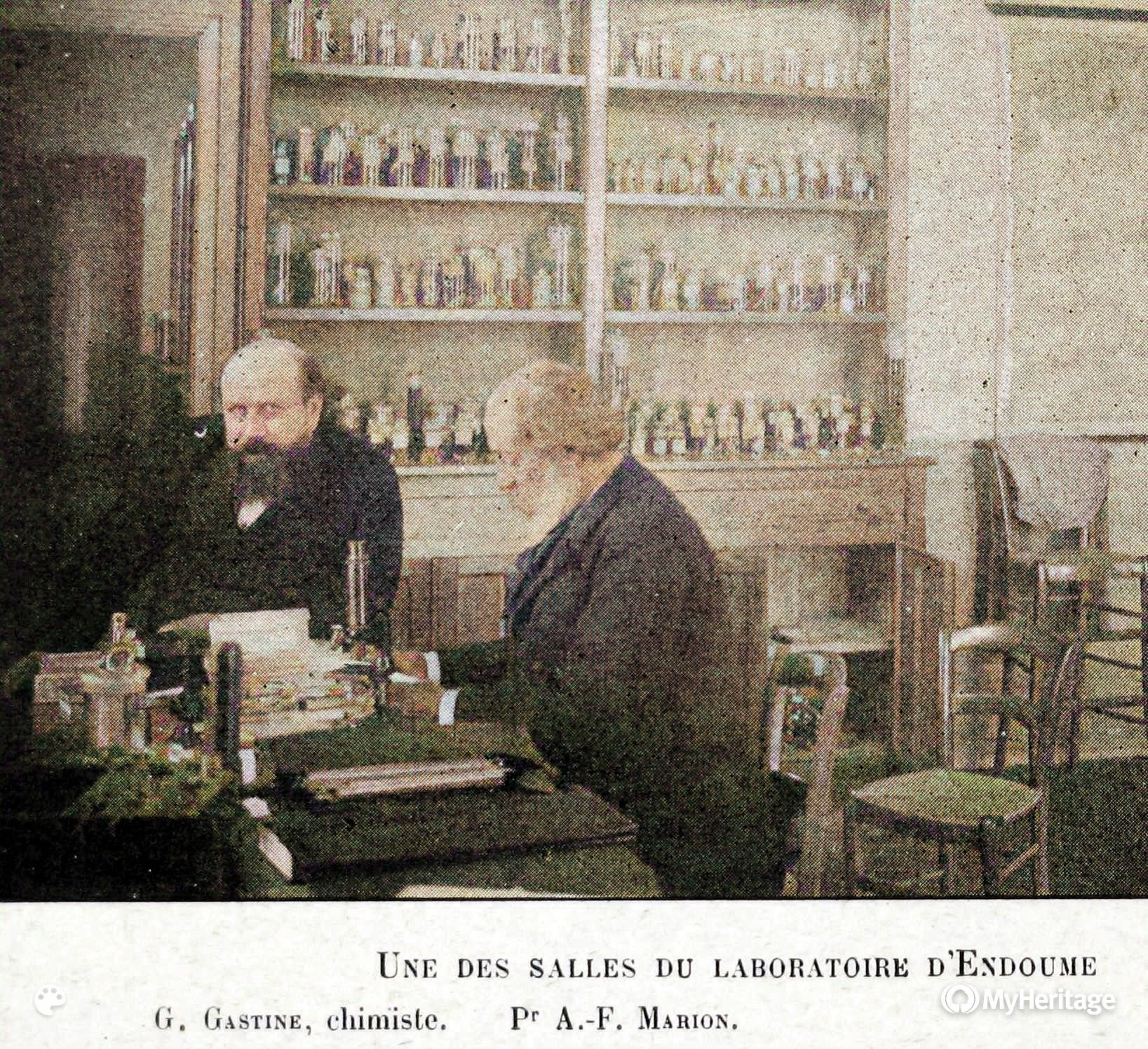 Le Professeur Antoine Fortuné Marion et G. Gastine dans une des salles du laboratoire d'Endoume (Marseille, Franc), en 1897.